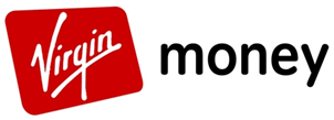 Logo des Unternehmens Virgin Money